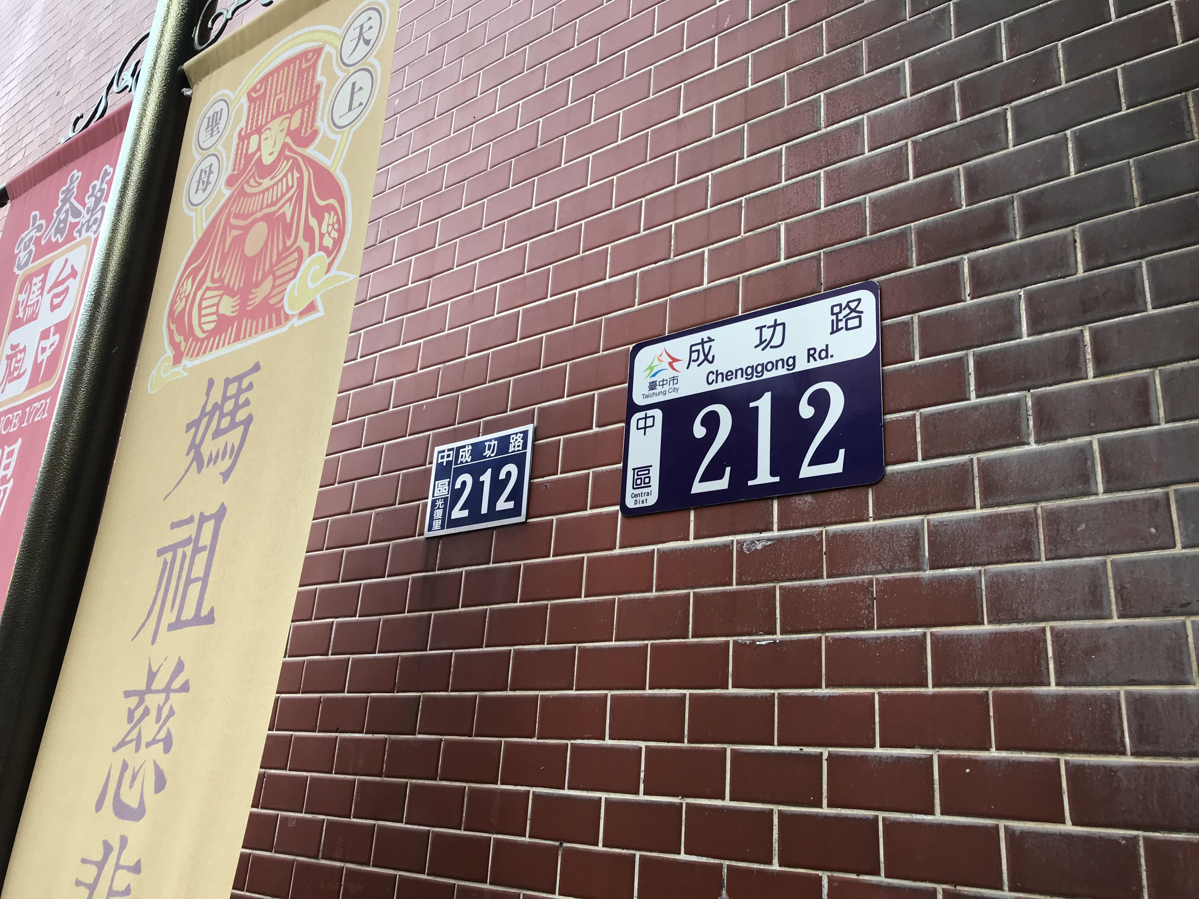 萬春宮門牌